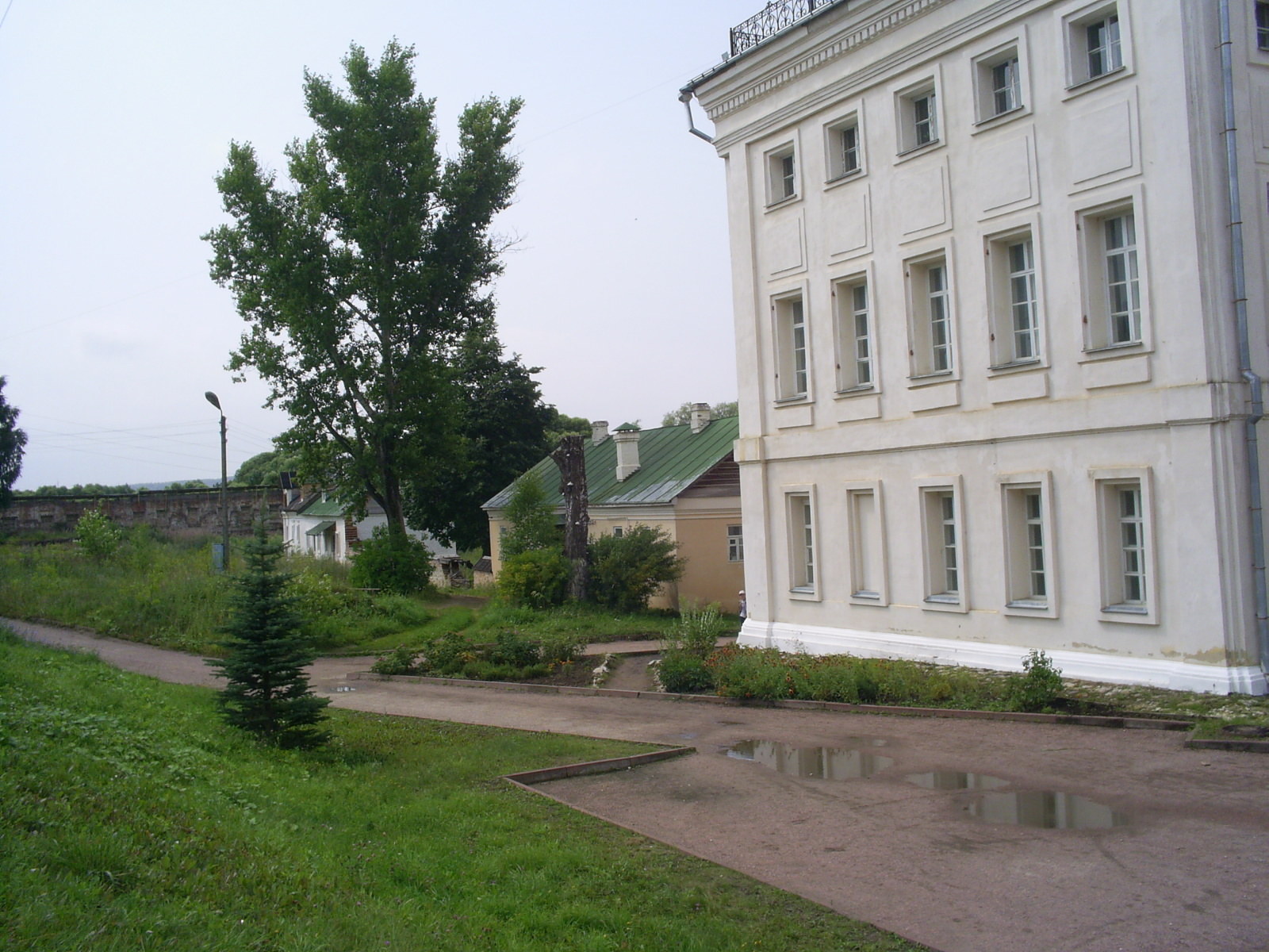 Остаток стены бумажной фабрики Гончаровых в посёлке Полотняный завод